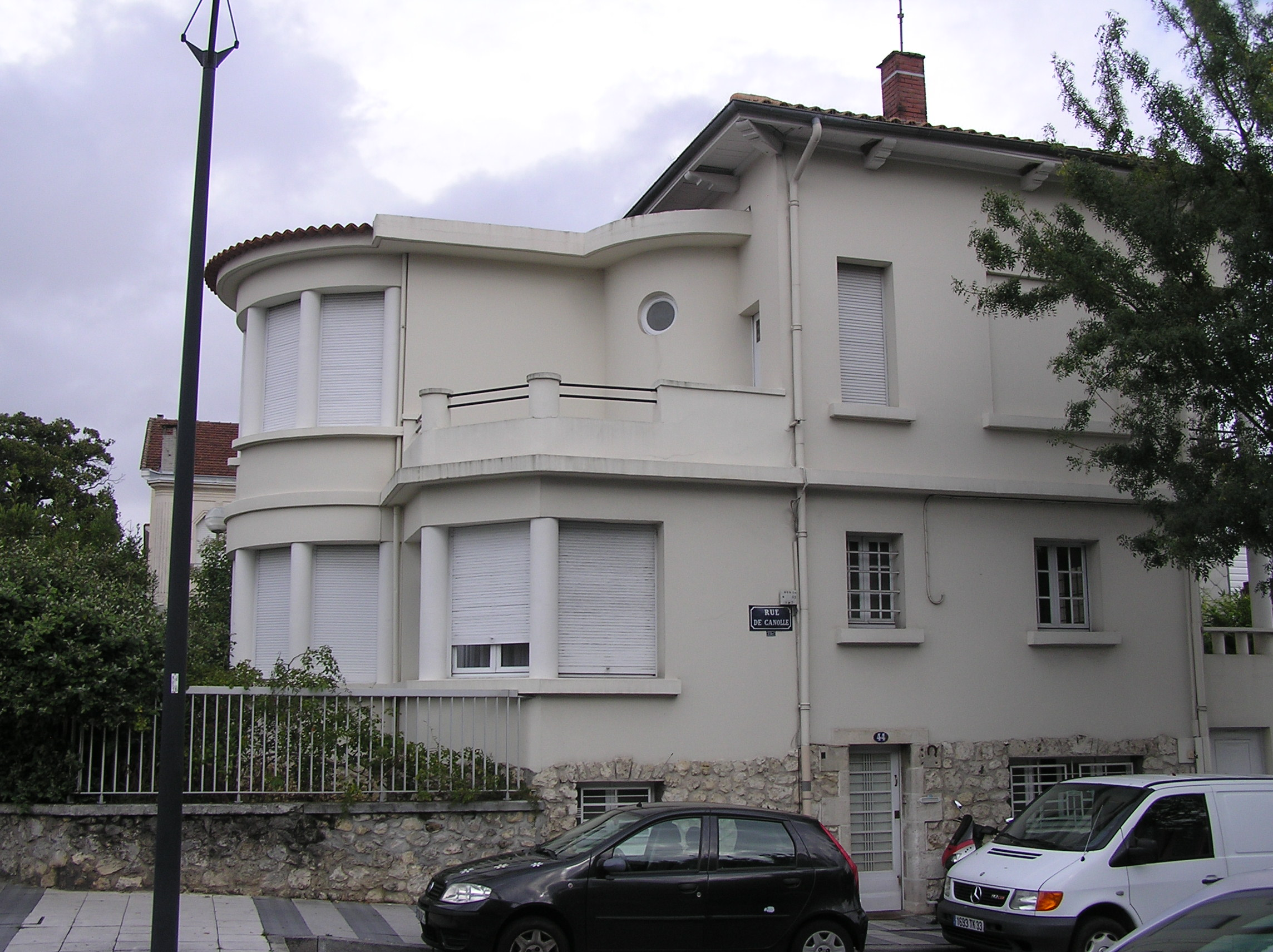 Bordeaux quartier Lescure maison art déco